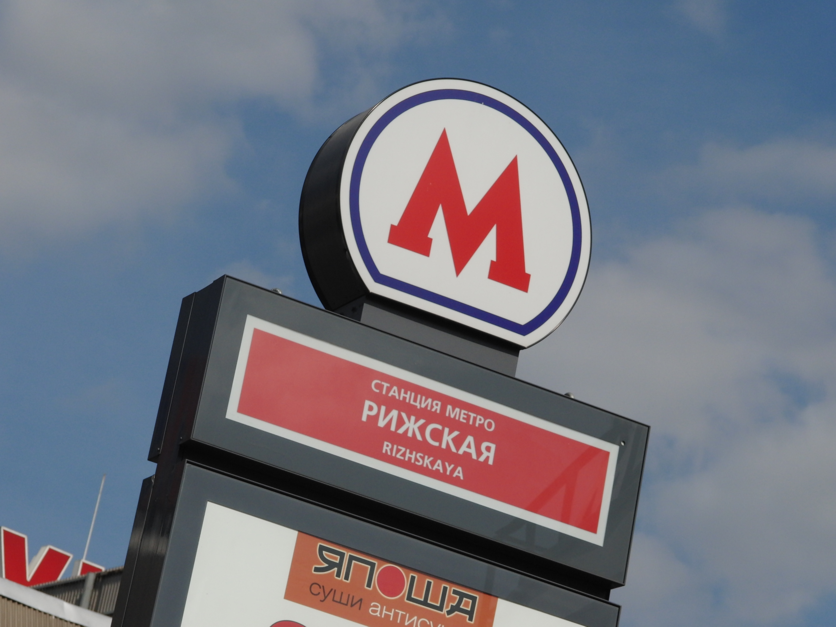 Vestibule of Rizhskaya station, Moscow Metro sign (Вестибюль станции Рижская, знак Московского Метро)